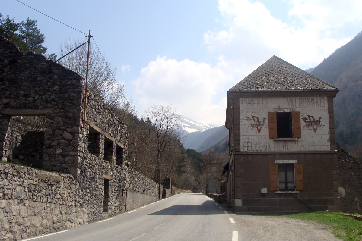 Ruines de l'ancienne cimenterie de Pont-du-Prêtre, de part et d'autre de la route (D 526), à l'entrée du Valbonnais (Isère).